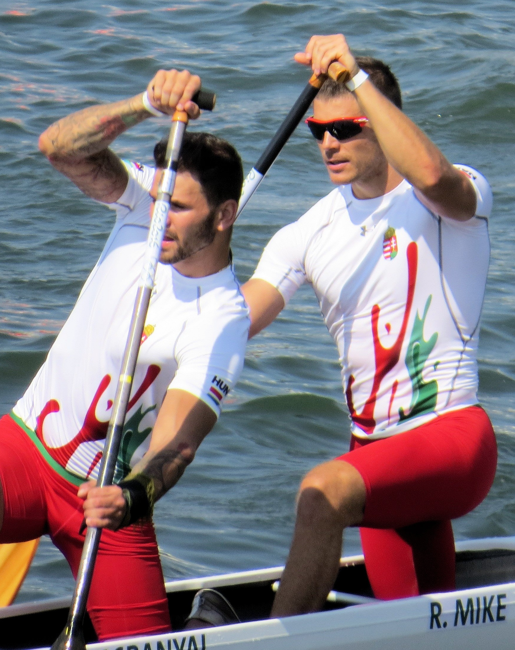 Sx50